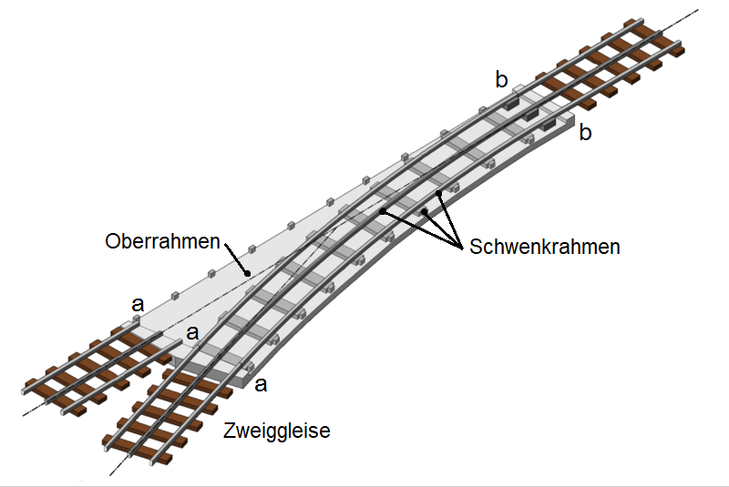 Federweiche RIGI-VTW 2000